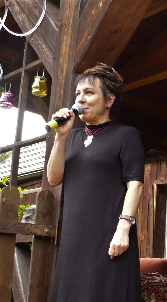 Olga Tokarczuk, Krajanów